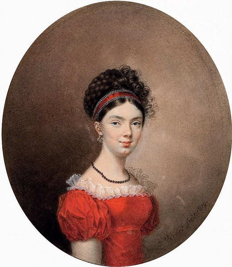 Мария Ивановна де Траверсе, дочь адмирала маркиза Ивана Ивановича де Траверсе (1754—1831).